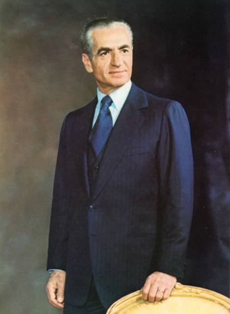 Portrait de SMI Mohammad Reza Chah, empereur d'Iran